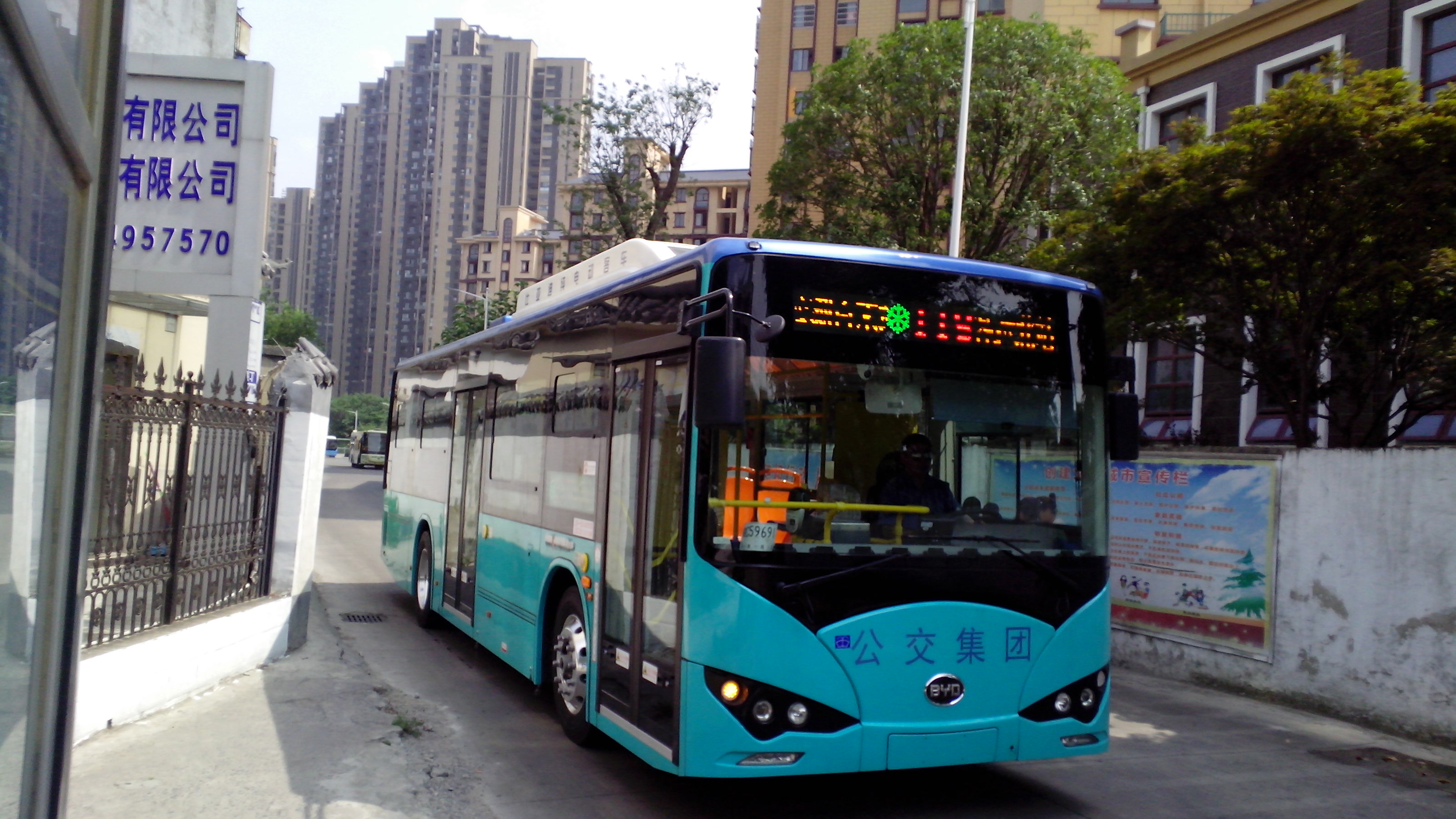 中文（中国大陆）: Bengbu Bus No.119 at Zhanggonghu